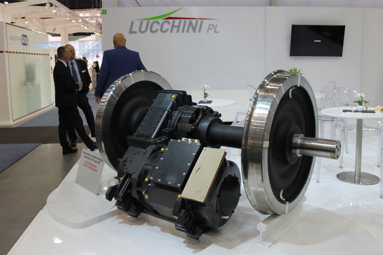 Zestaw kołowy prezentowany przez Lucchini podczas targów Trako 2015. The making of this document was supported by Wikimedia Polska Association, within Wikigrant no. WG 2015-34. English | polski | +/−